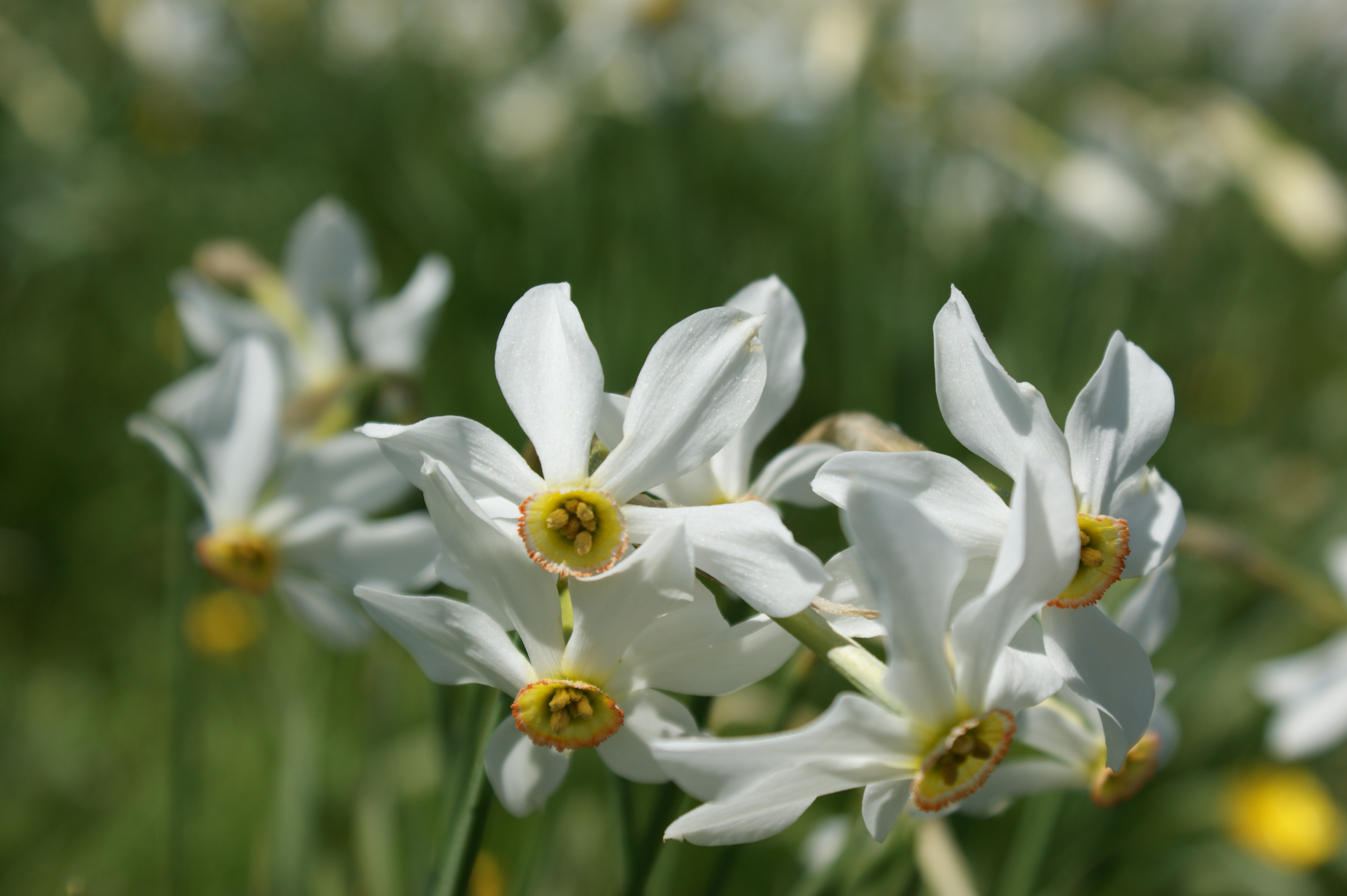 Weiße Narzissen auf Les Pléiades